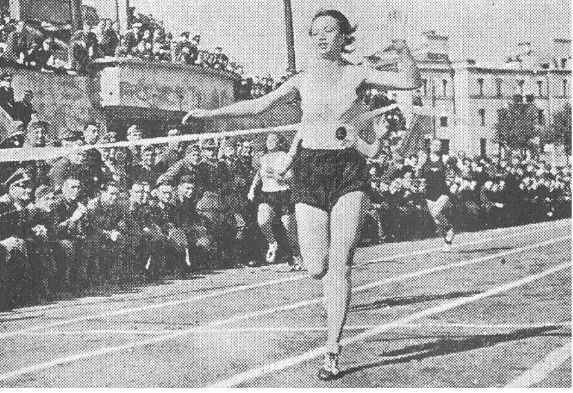 Беларуская (тарашкевіца): Менск (Miensk), Ляхаўка (Lachaŭka). Стадыён Дынама (Dynama)